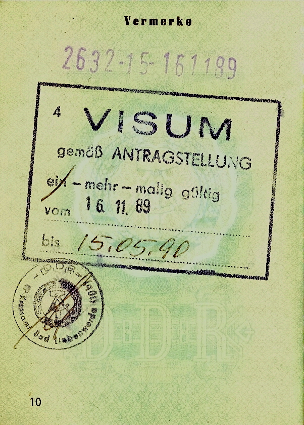 Personalausweis der DDR, 1989, Seite 10, Visum-Stempel um in die BRD zu gelangen